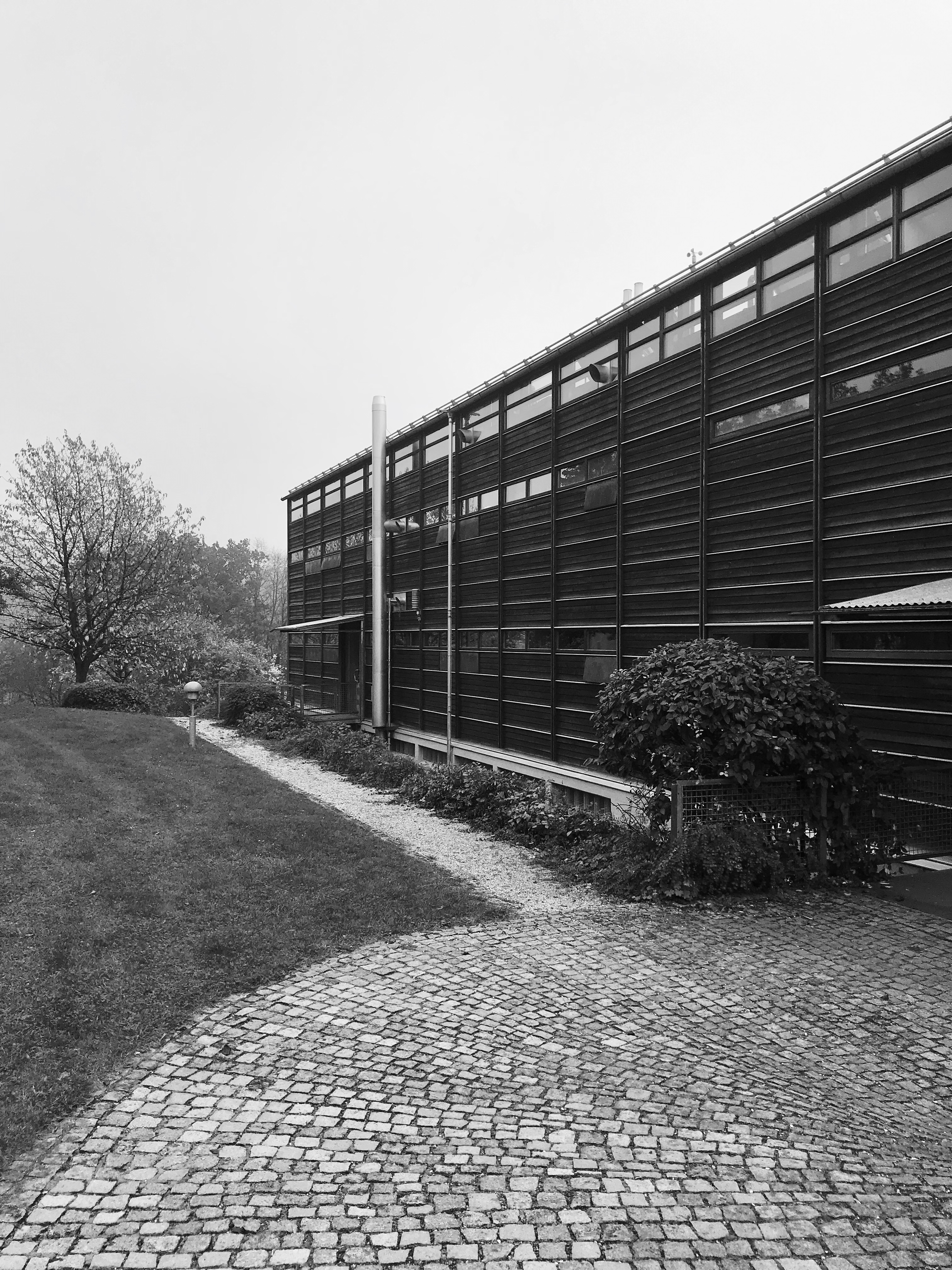 Windberg